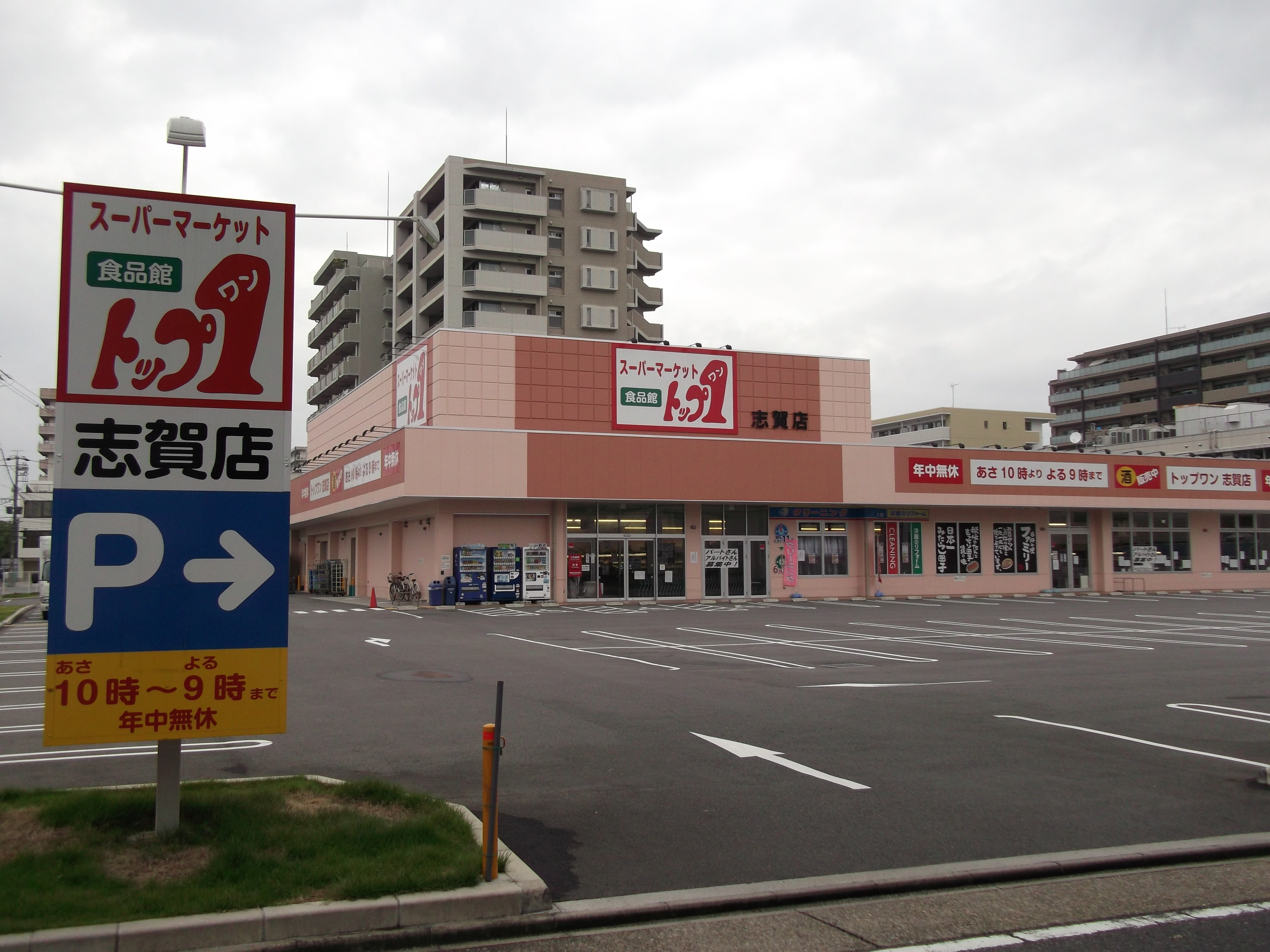 名古屋市北区水草町のスーパーマーケットトップワン志賀店を東側公道南側より撮影